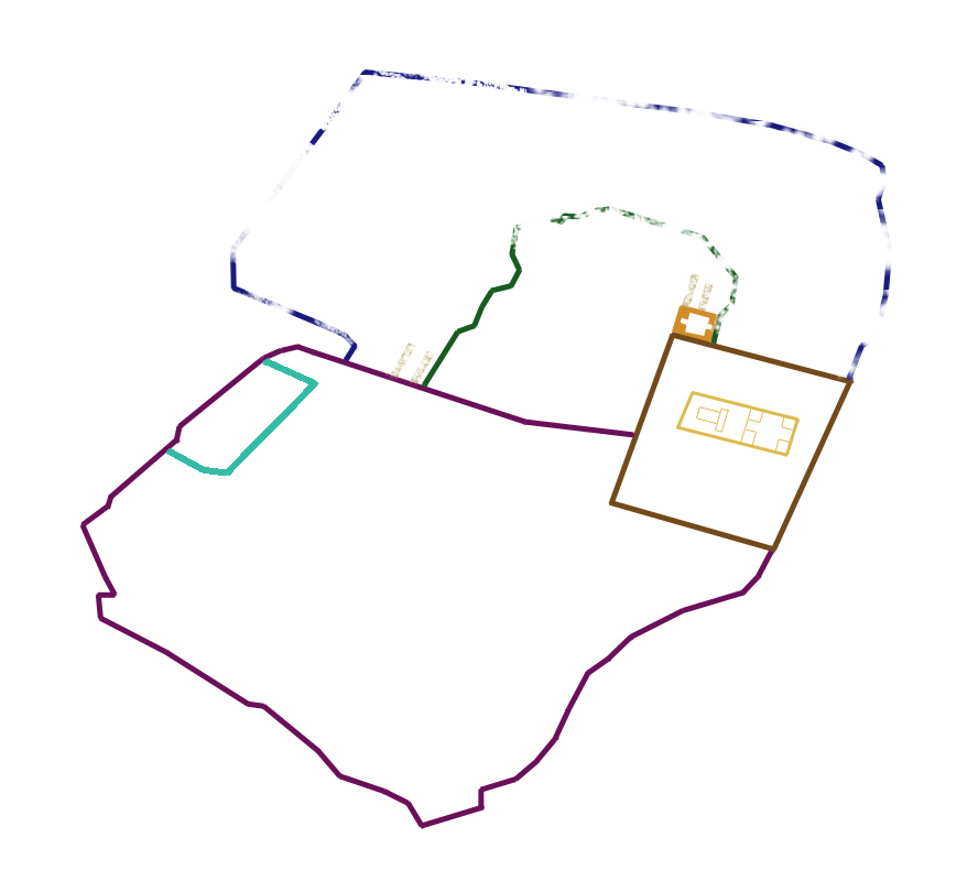 ירושלים 70 - הריסת הסוללות השניות